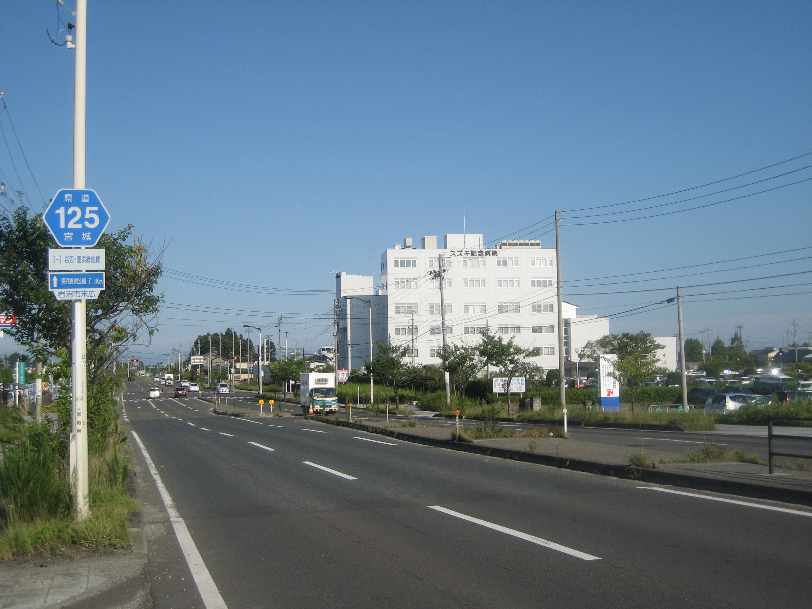 宮城県道125号線岩沼市末広付近